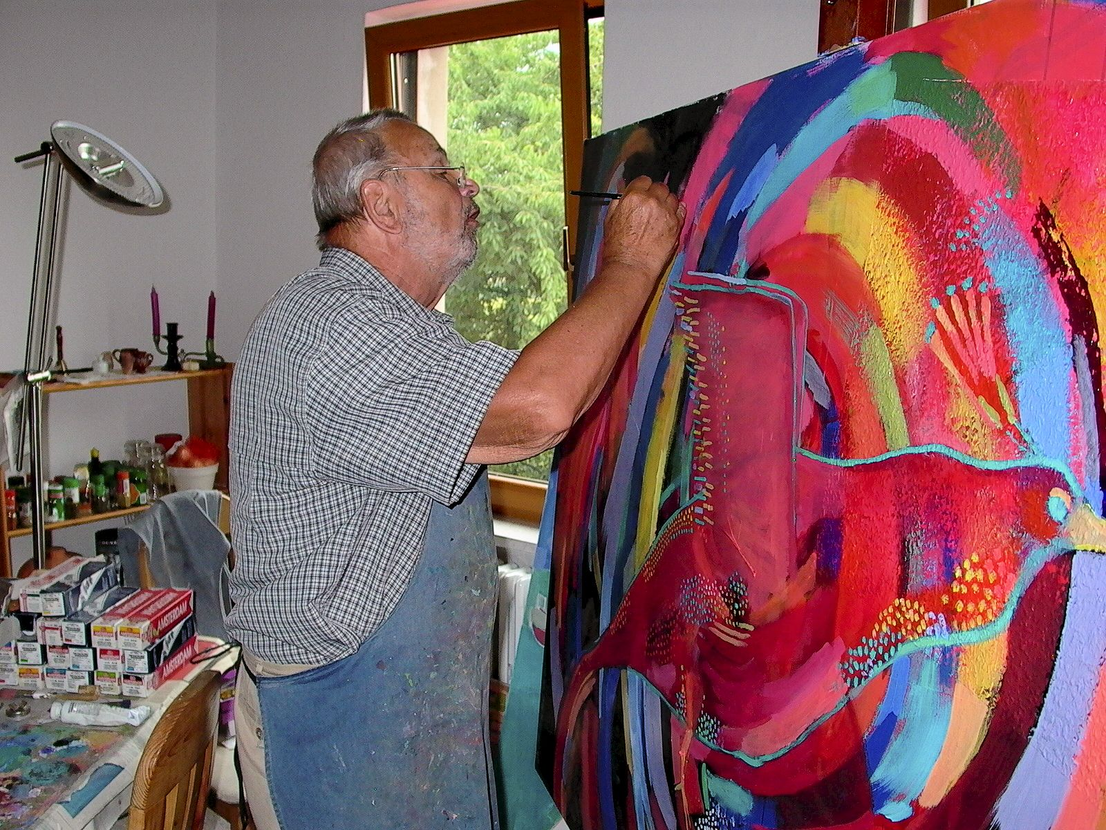 Detlef Winter arbeitet am Bild "Feuervogel" (c) Archiv Detlef Winter